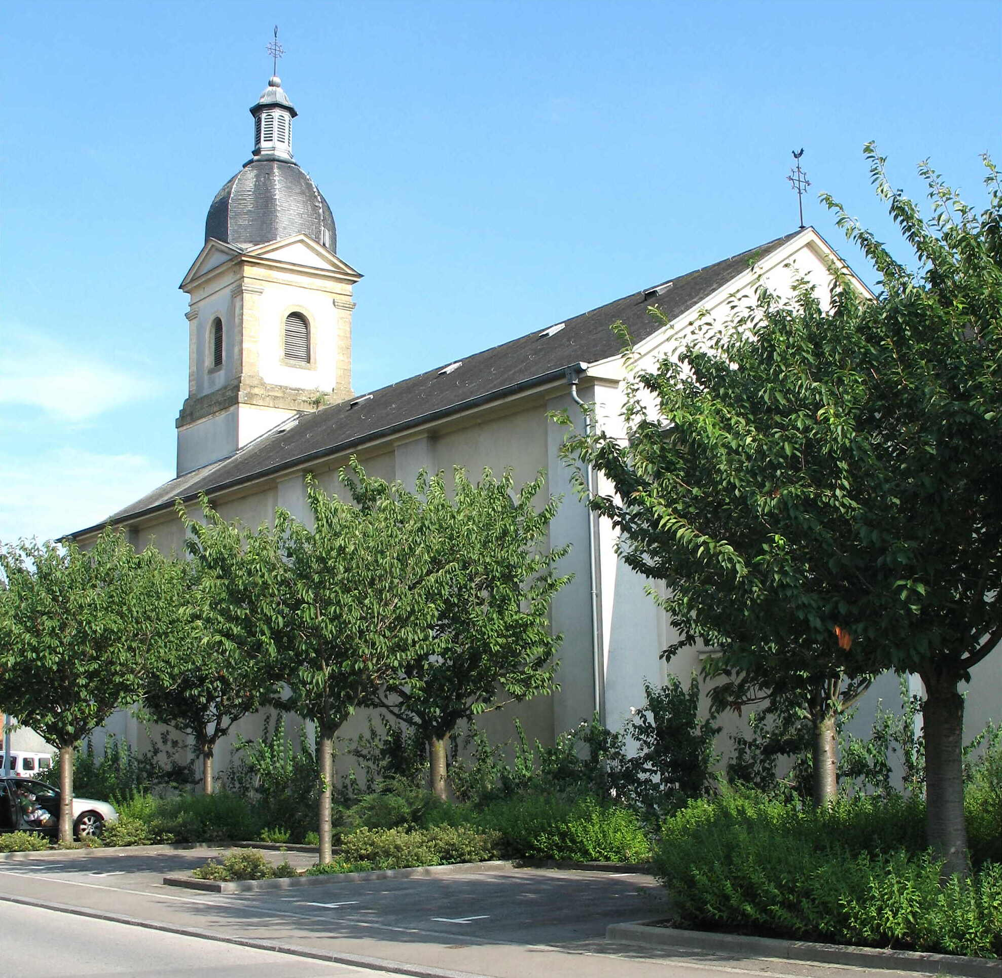 Kierch vu Miesdref